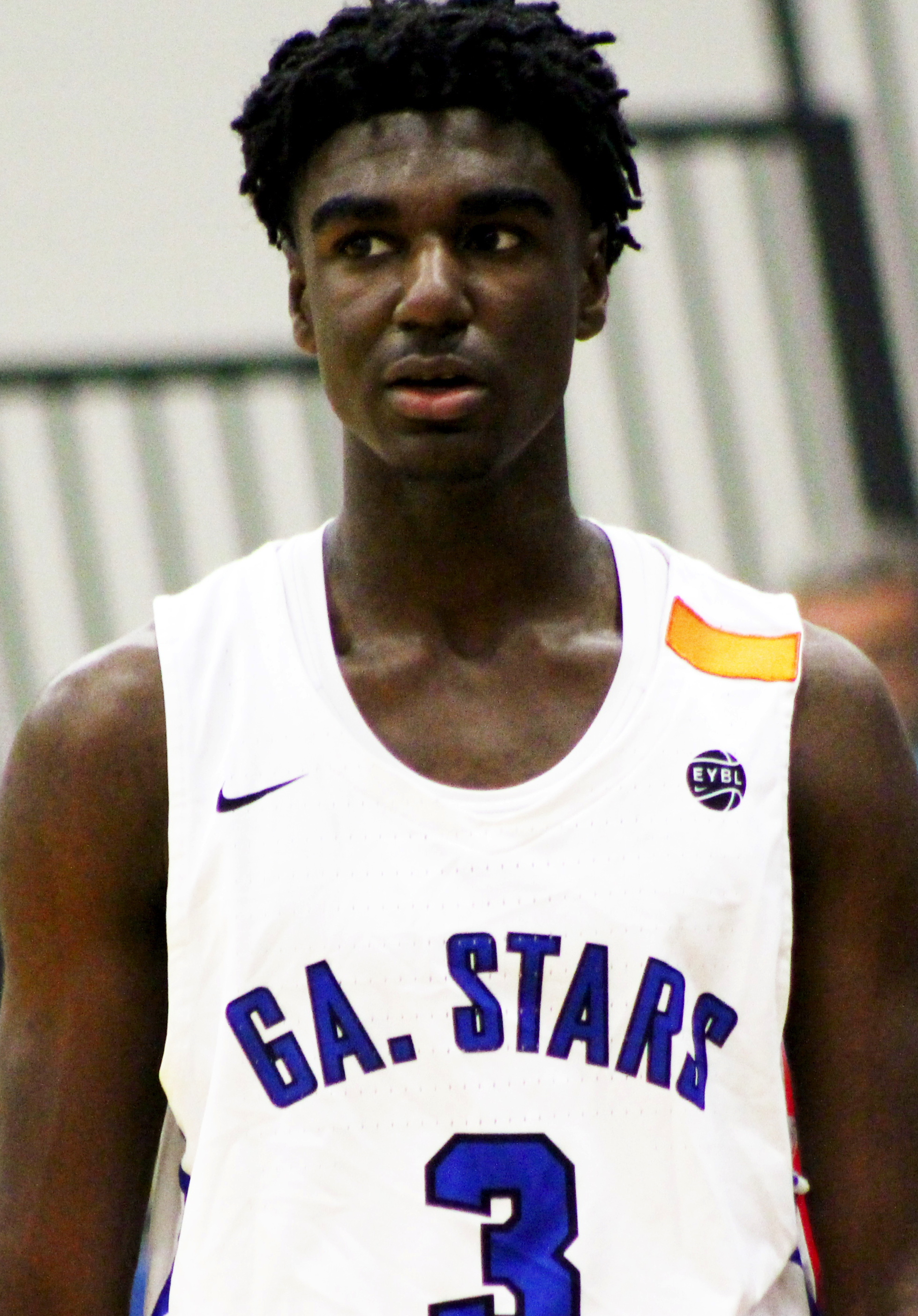 Kira Lewis 1_wm